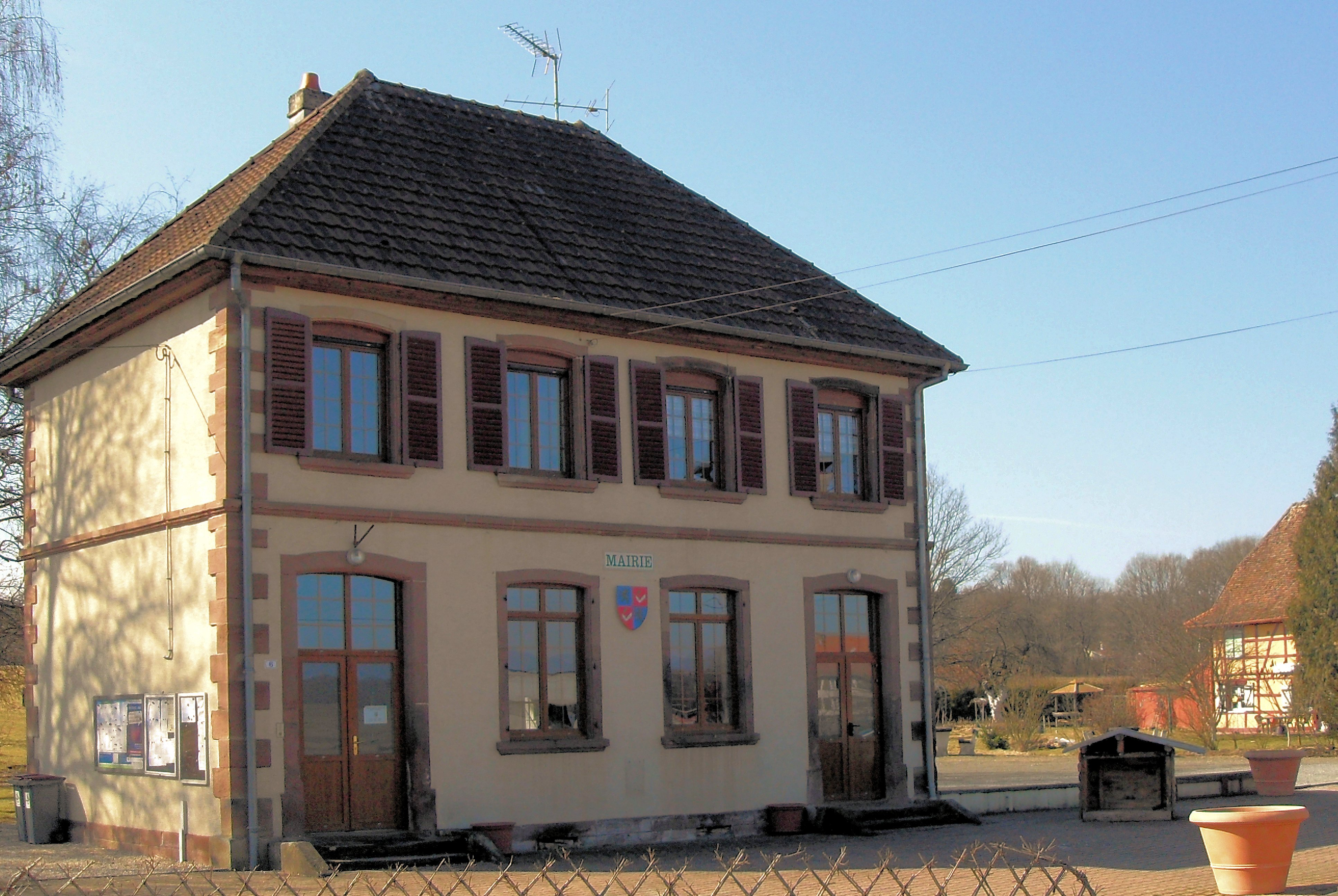 La mairie de Fontenelle